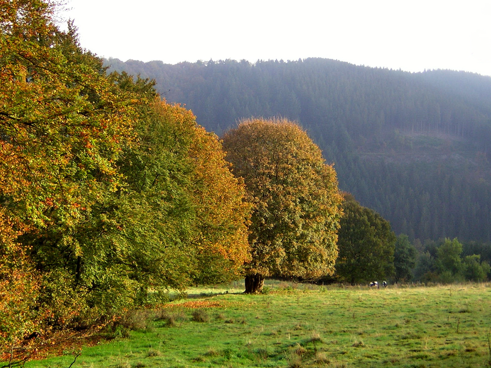 Rinderweide; Herbst in der Nordeifel zwischen Monschau und Höfen